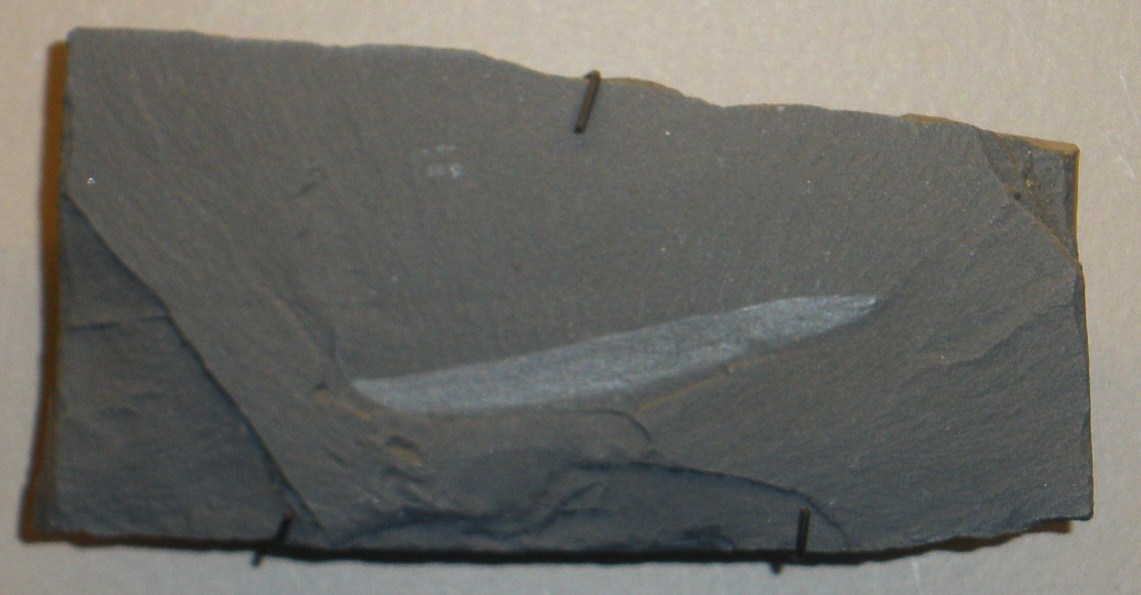 Fossil of Pikaia, an extinct chordate Took the photo at Musee d'Histoire Naturelle, Brussels